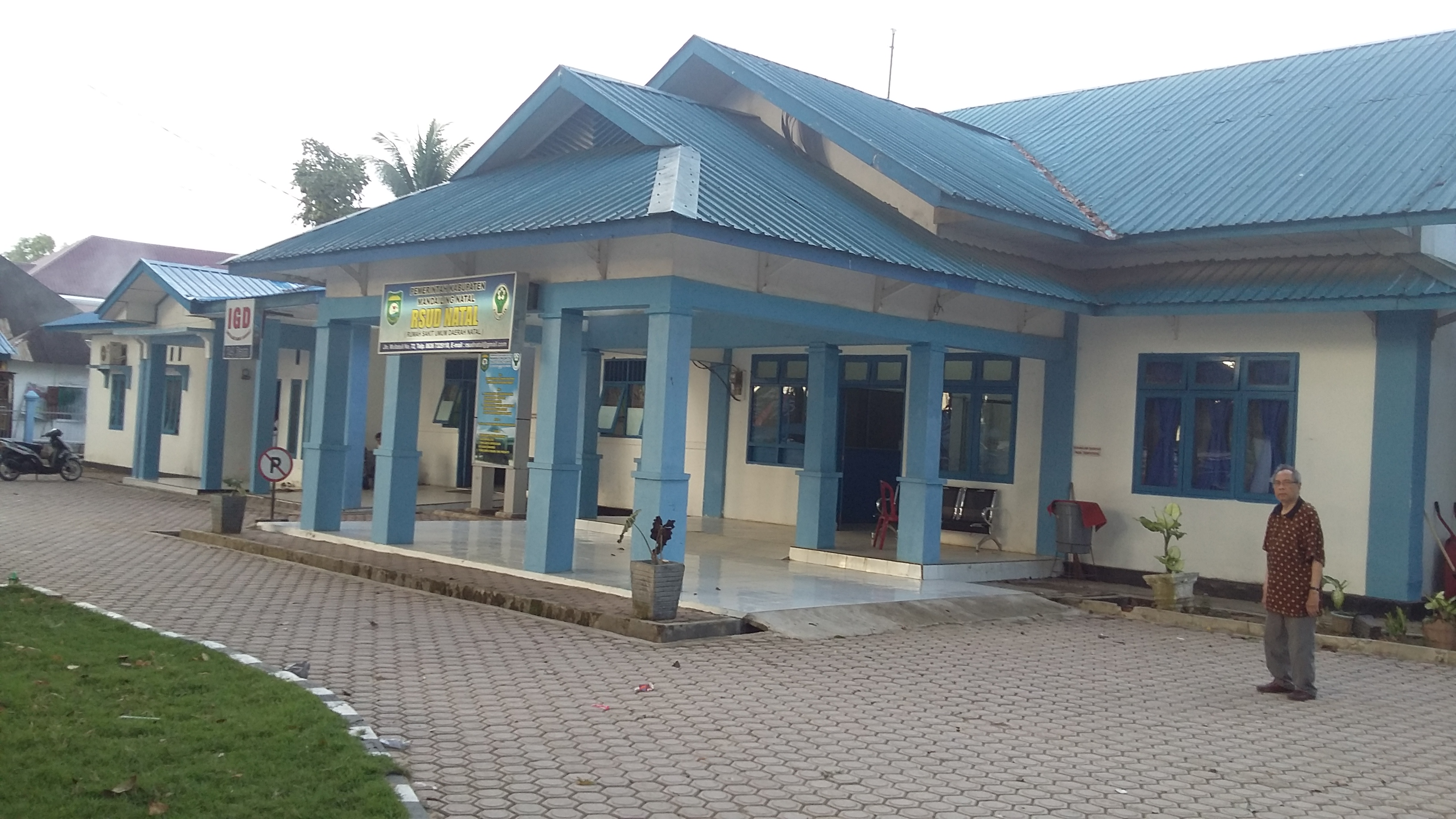 La clinique de Natal en Indonésie, anciennement le bureau et la résidence du controleur Eduard Douwes Dekker, dit Multatuli, auteur du roman-pamphlet Max Havelaar